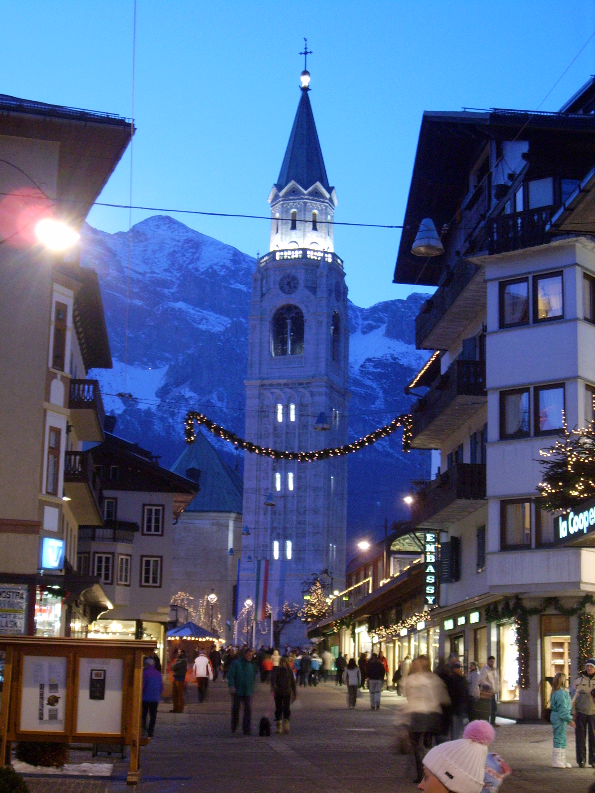 Campanile Ss.Filippo e Giacomo, Cortina d'Ampezzo, Belluno, Veneto, Dolomites, Italy